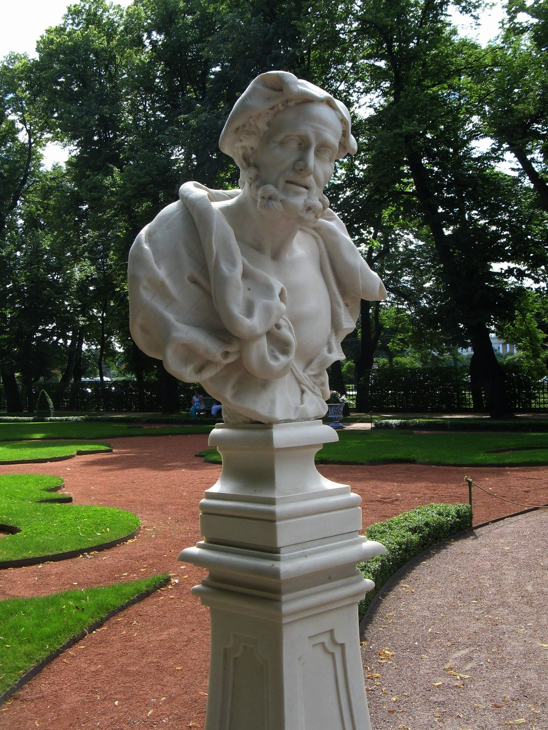 Бюст Аристотеля (Санкт-Петербург, Летний сад, партер, северная часть)